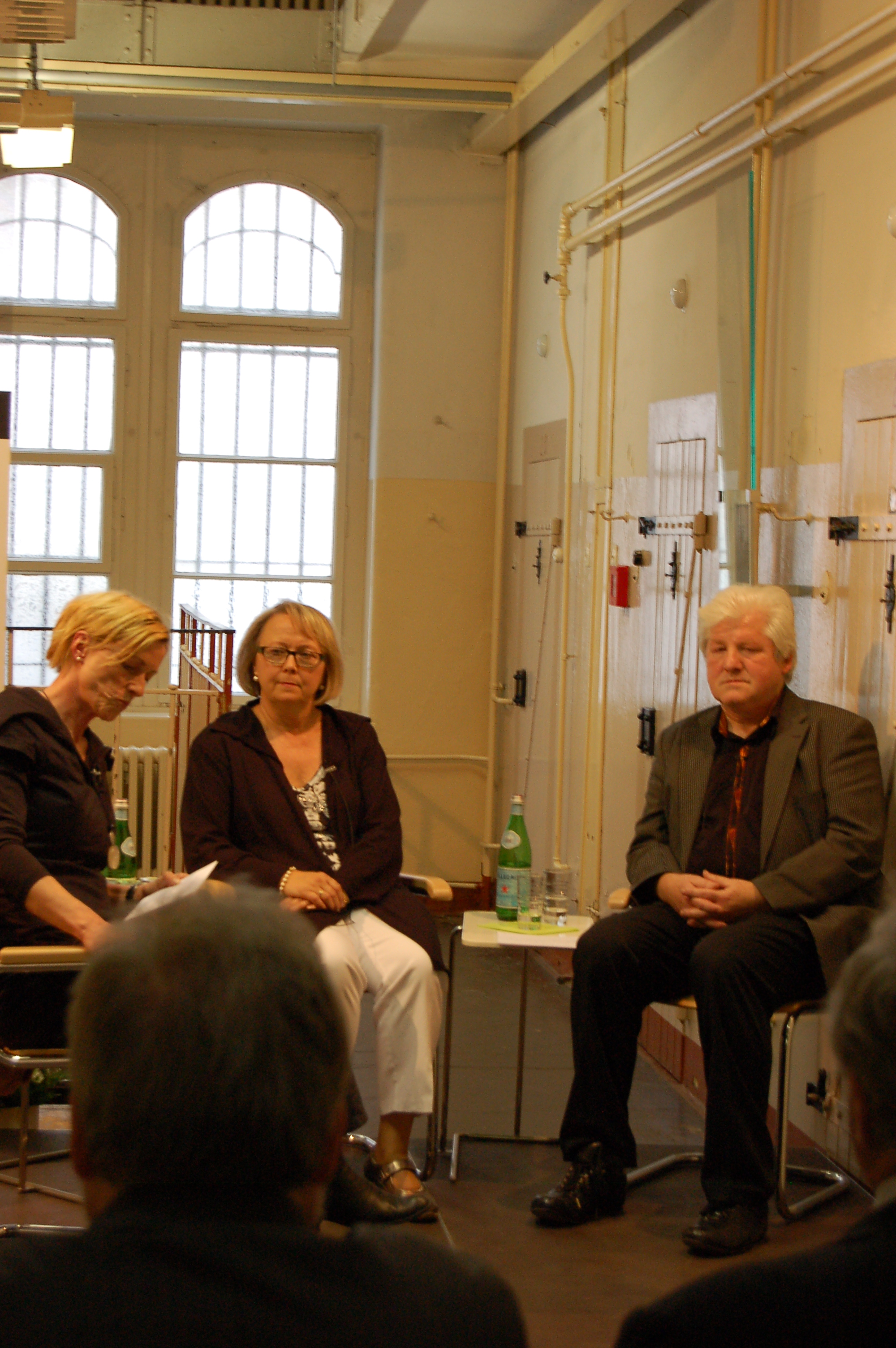 Das Ehepaar Christa und Peter Gross (Mitte und rechts im Bild) im Zellentrakt der Gedenkstätte Bautzen im Mai 2011.